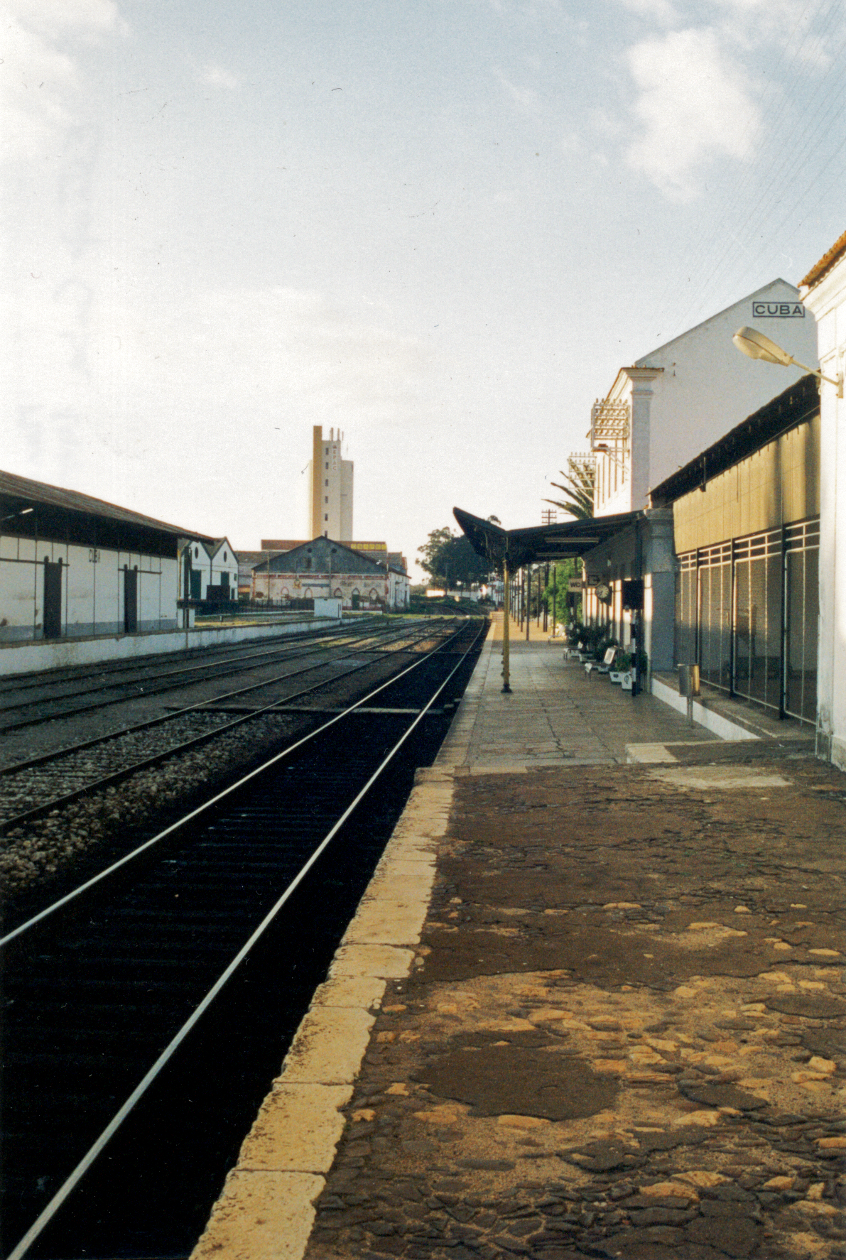 Tipo: E [Estação] Local: Cuba [Linha do Alentejo, PK 137] Data e hora: Março de 1999 [pela tarde]